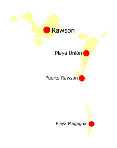 Mapa que hice del ejido urbano de Rawson